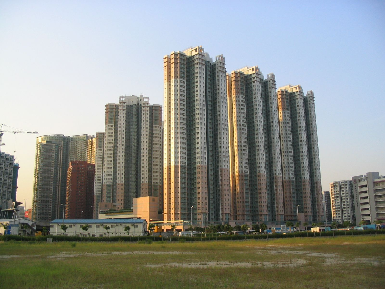 紅磡-紅灣半島 Hunghom Peninsula, Hung Hom